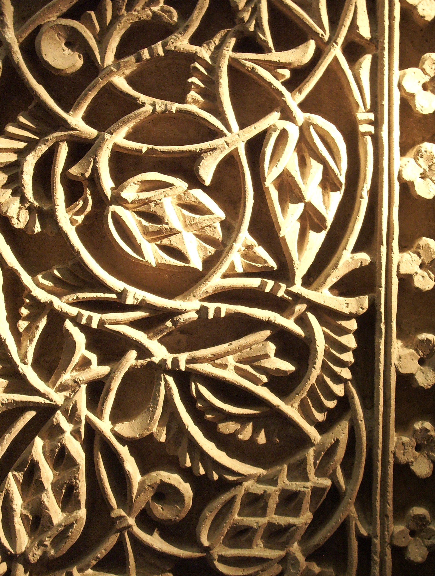 detalle panel vertical de la Aljafería